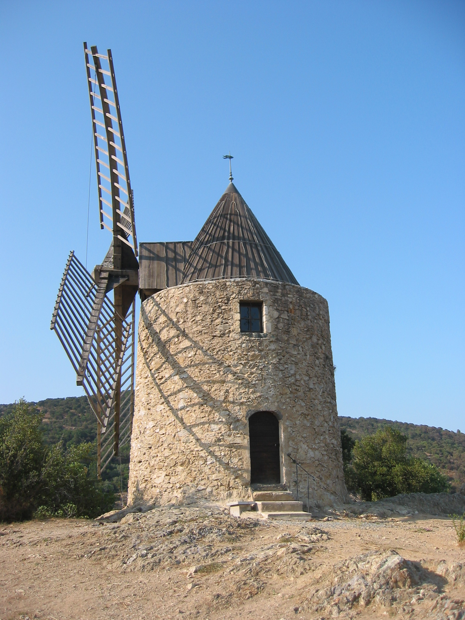 Grimaud, Var, France Le moulin. 5 juillet 2006 Author : civodule